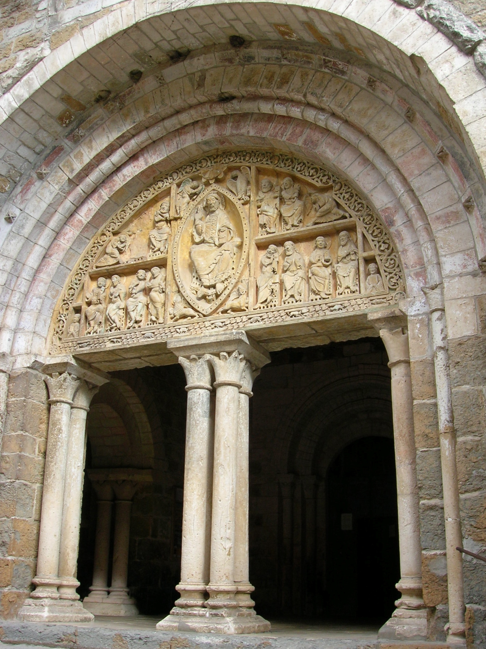 Tympan de l'église de Carennac dans le Lot